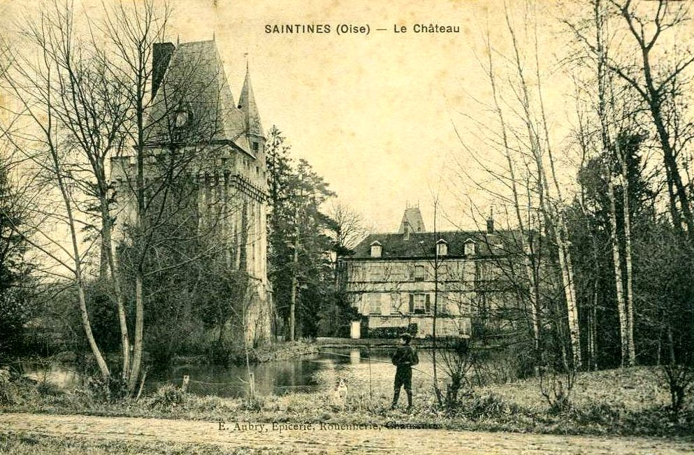 Le donjon de 1517 et le château de Saintines.